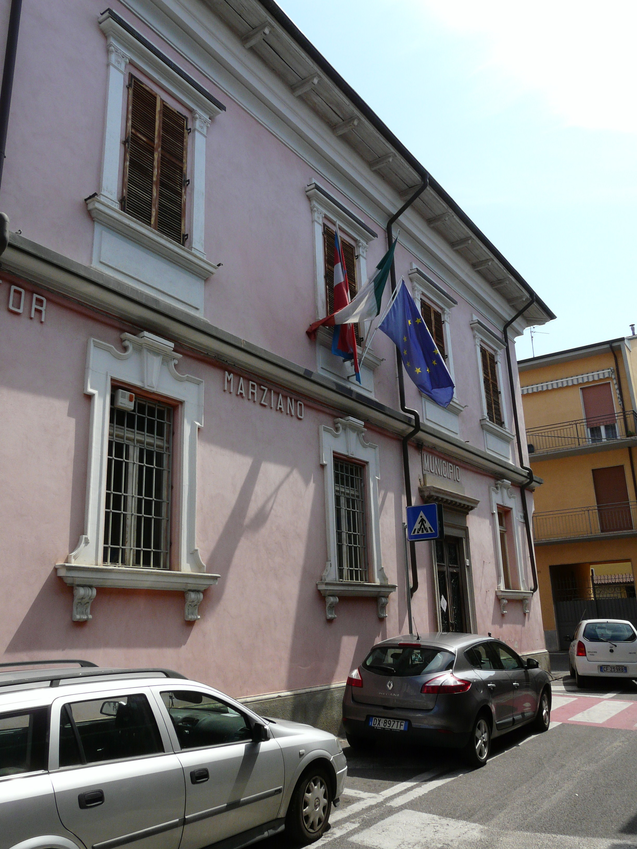 Municipio di Viguzzolo, Piemonte, Italia